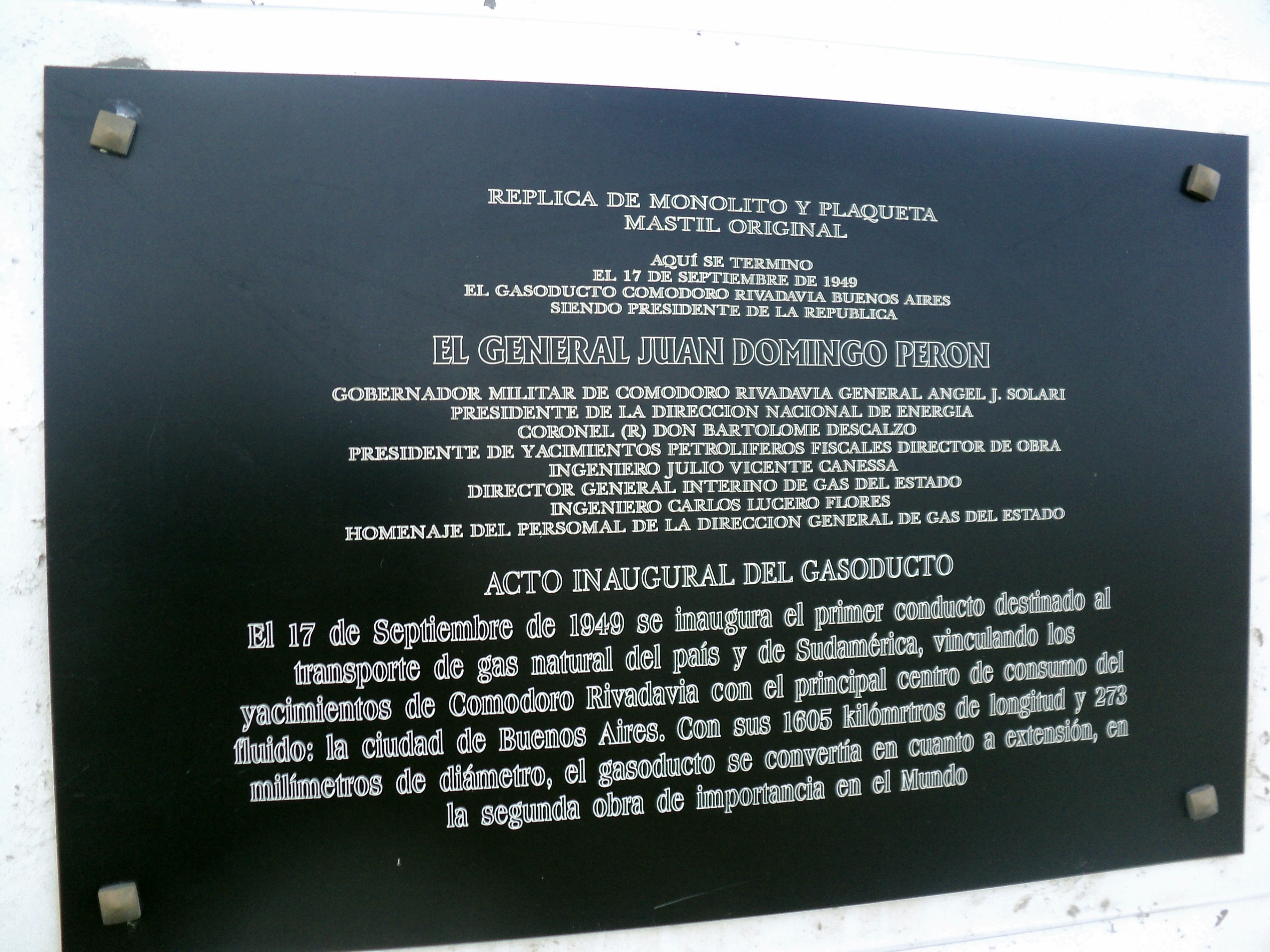 Placra la que conmemora la apertura del gasoducto CR-BS AS